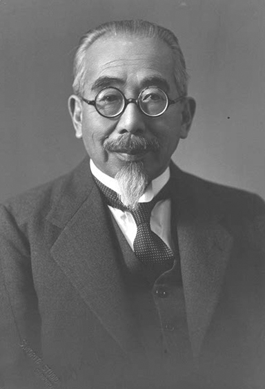 宮部金吾(Miyabe Kingo,1860-1951)